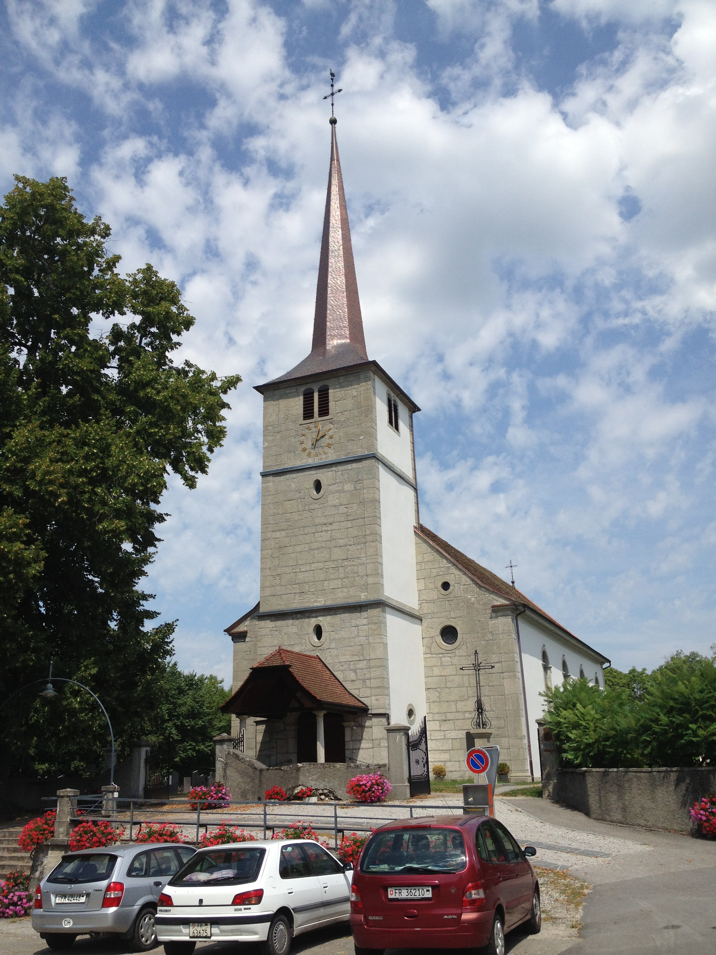 L'église de Surpierre dans le canton de Fribourg en Suisse.